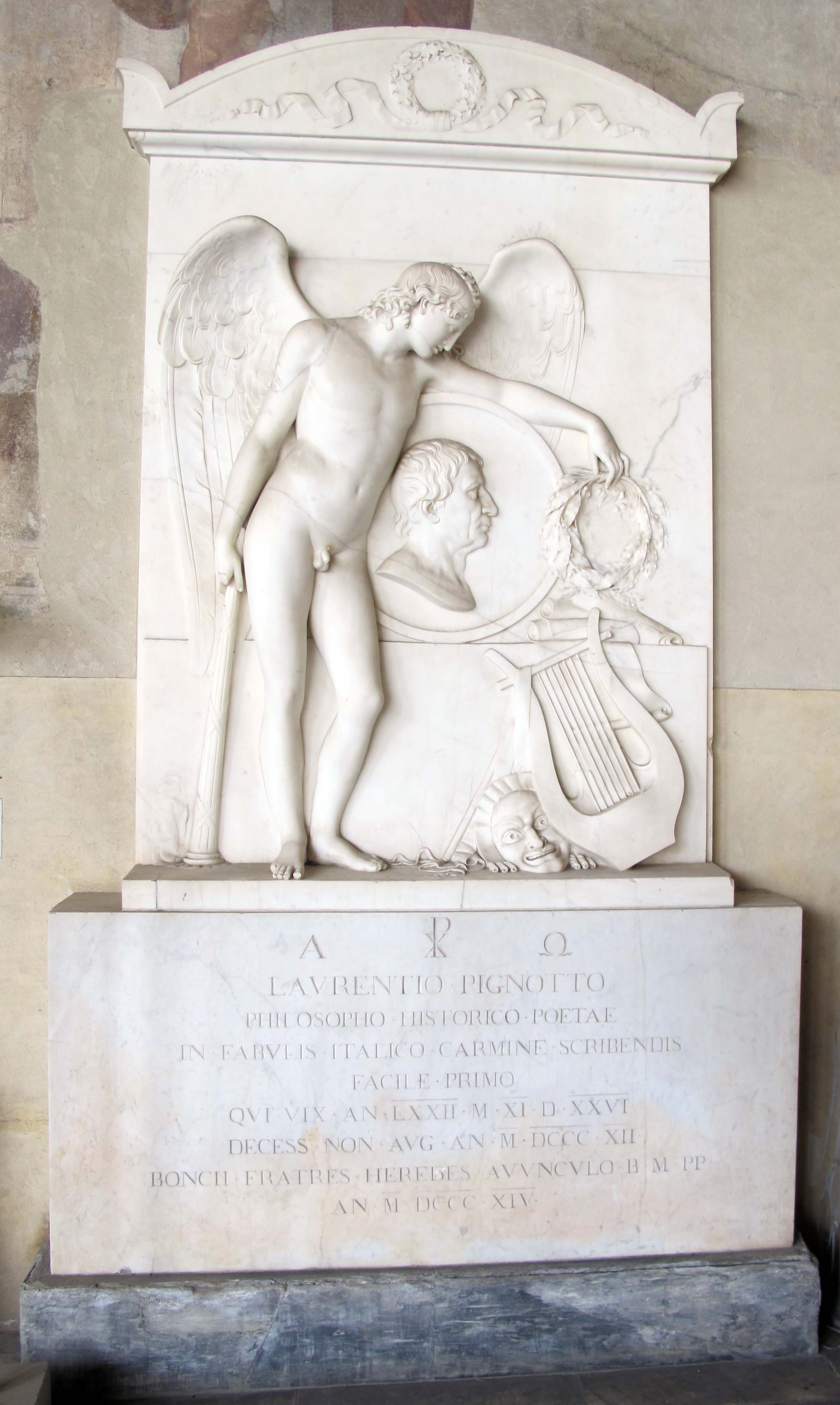 Tomba del fisico Lorenzo Pignotti (m. 1812) di Stefano Ricci